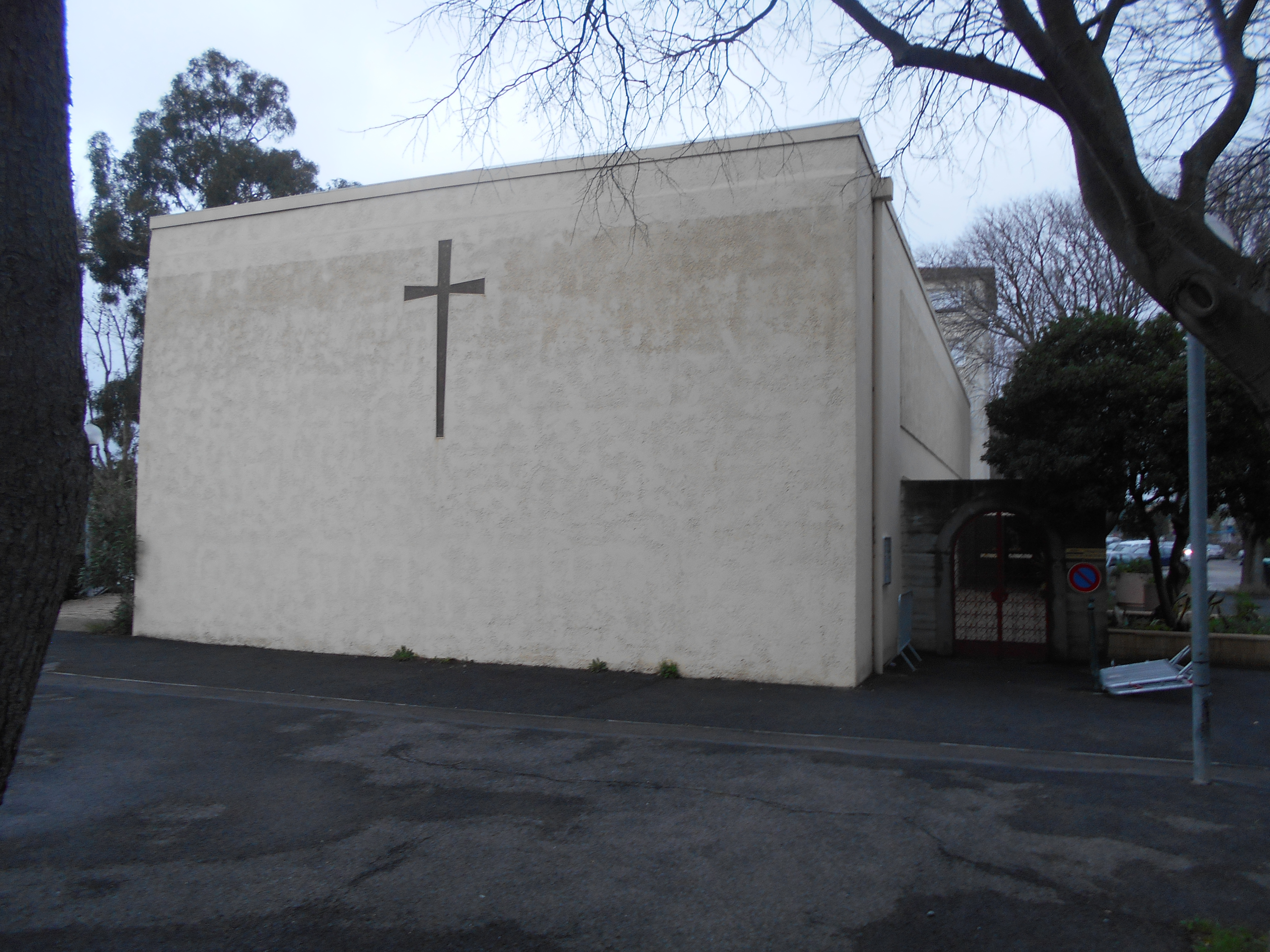 L'església nova de Sant Galderic de Perpinyà